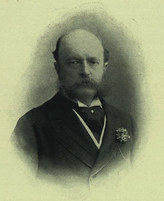 Grabado de Guillermo de Landa y Escandón (ca. 1903).